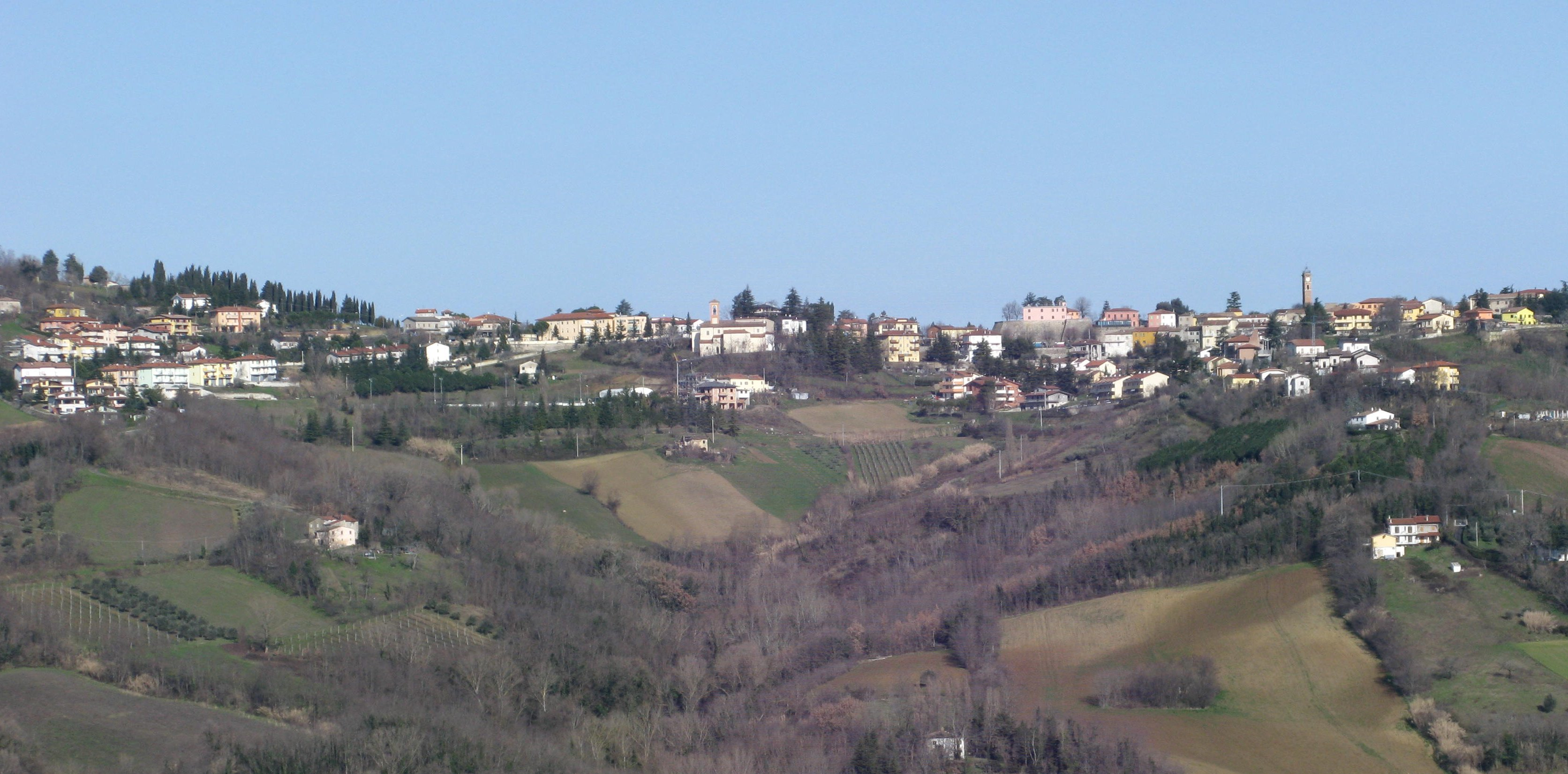 Panorama di Montescudo.